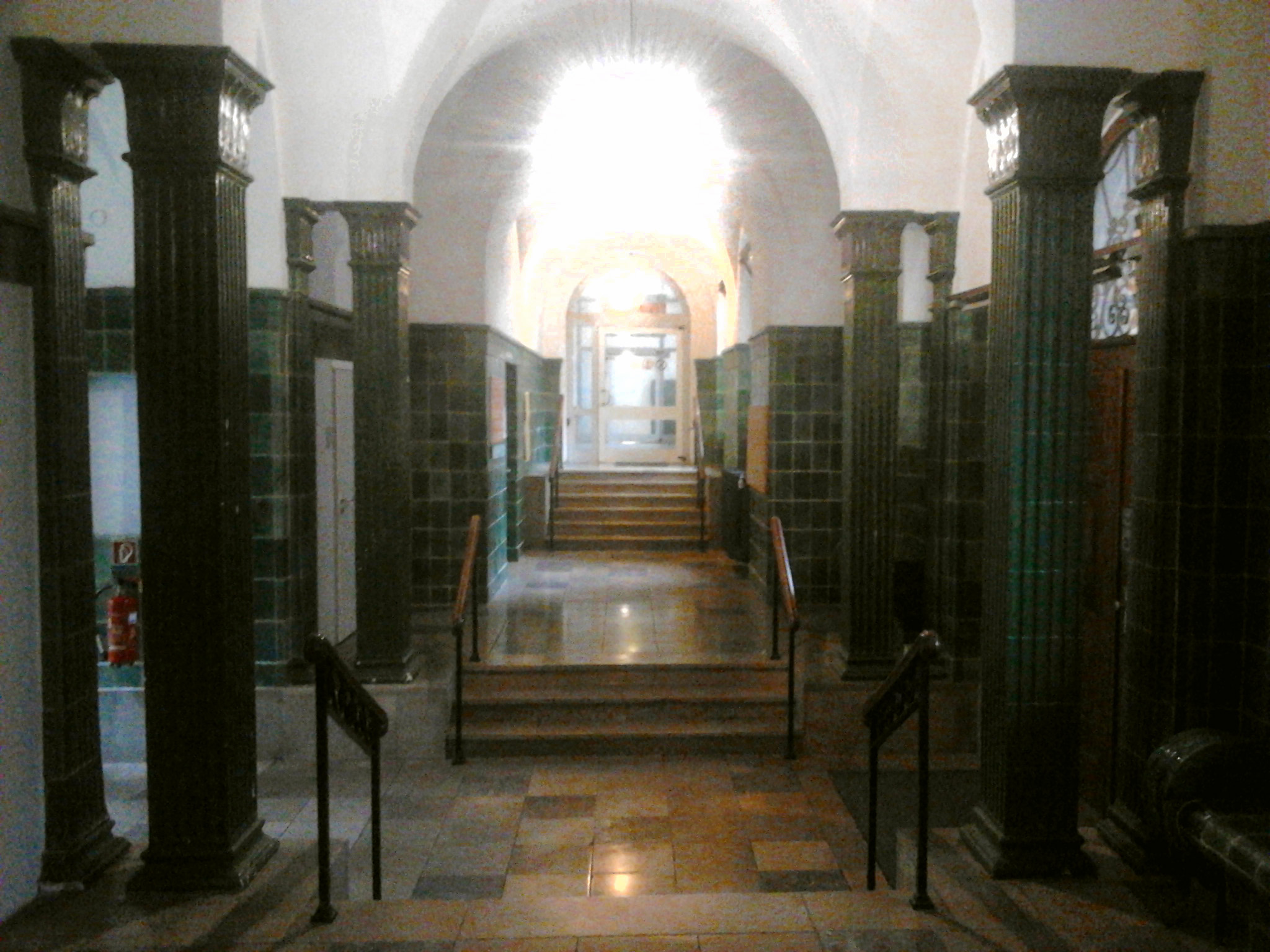 St. Josefskrankenhaus in Freiburg-Neuburg, Eingangshalle im Altbau, die den Bombenangriff vom 27. November 1944 überstanden hat